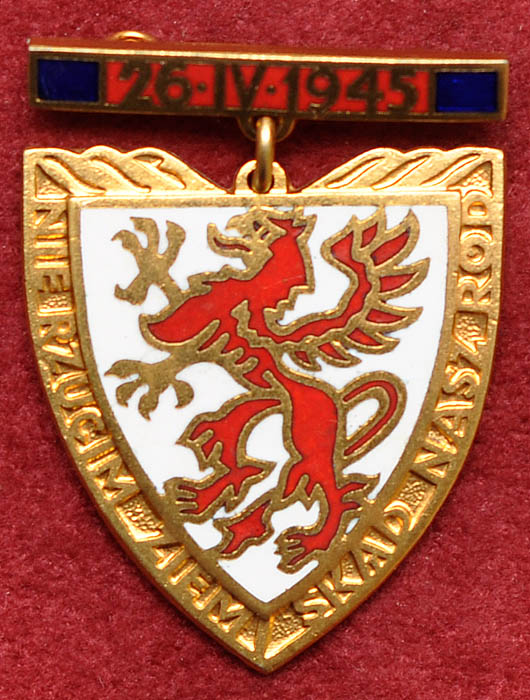 Odznaka Honorowa Gryfa Pomorskiego